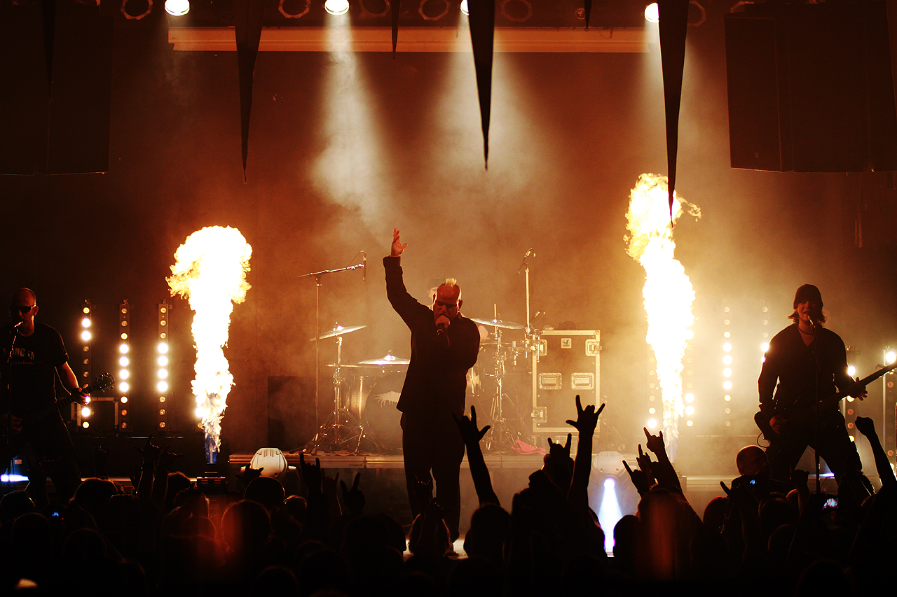 Mono Inc. als Headliner des ersten Dark End Festivals am 29.04.2012 in Herford.